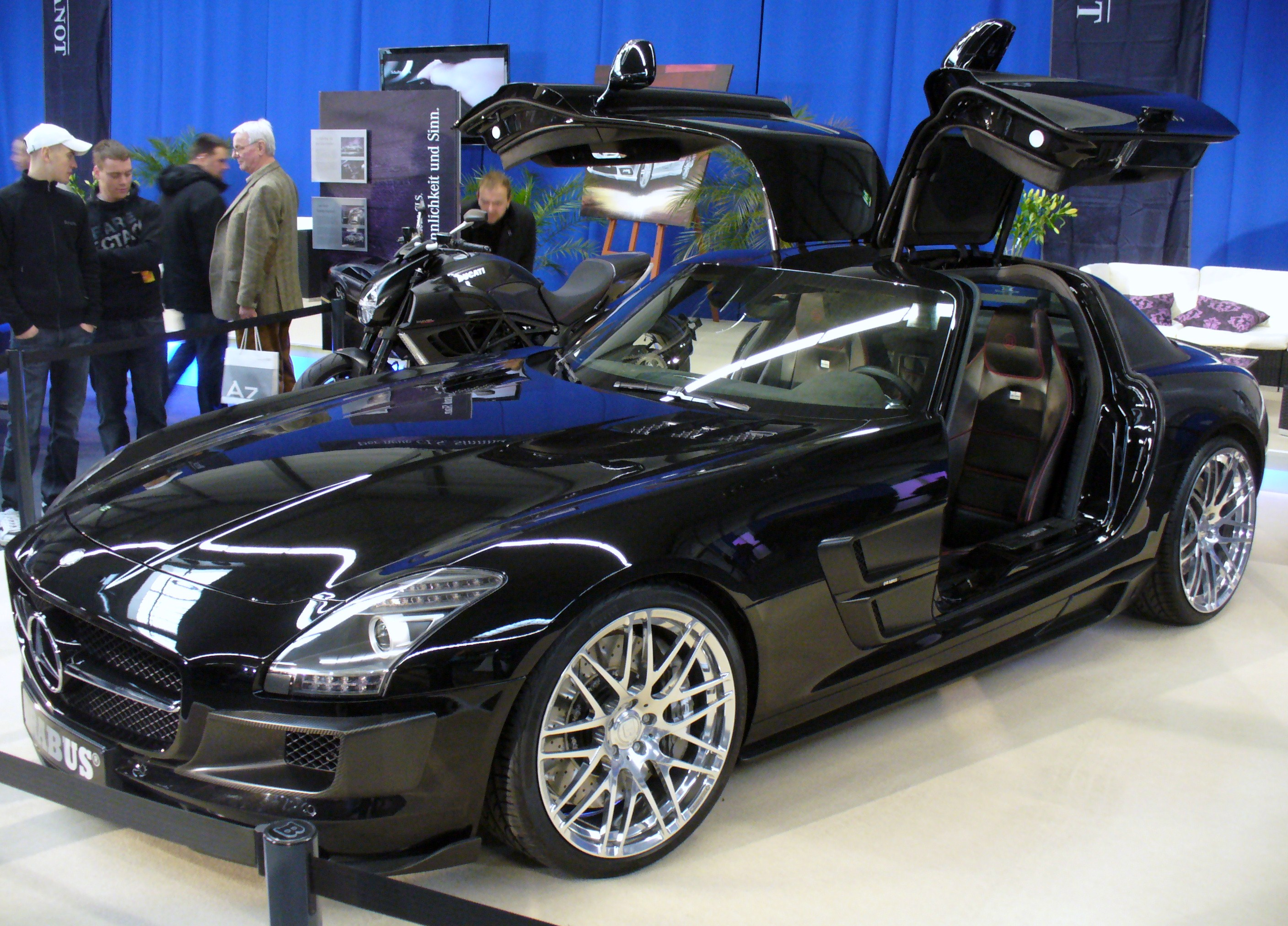 Brabus SLS AMG